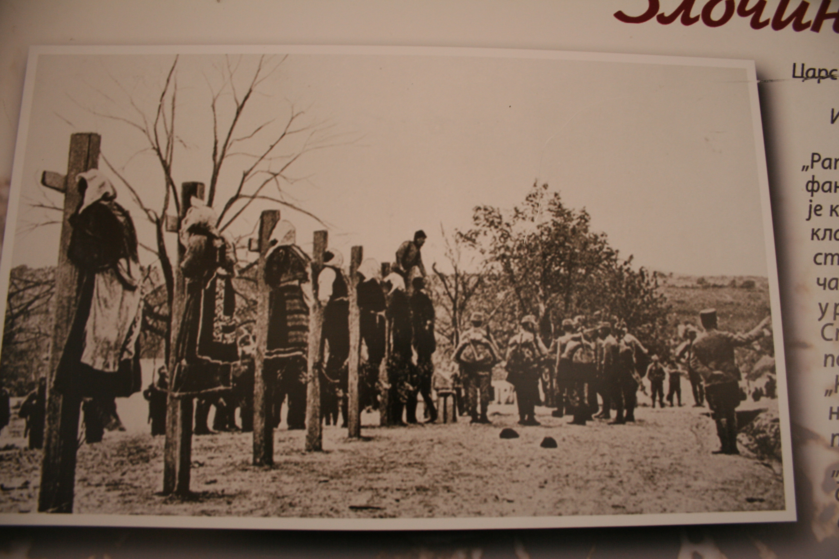 Memorijalna galerija Bitke na Drini 1914. Banja Koviljača